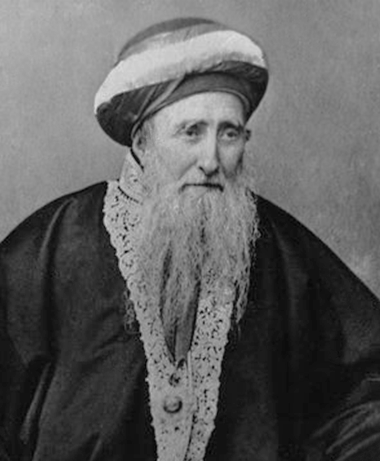 ר' אברהם פלאג'י